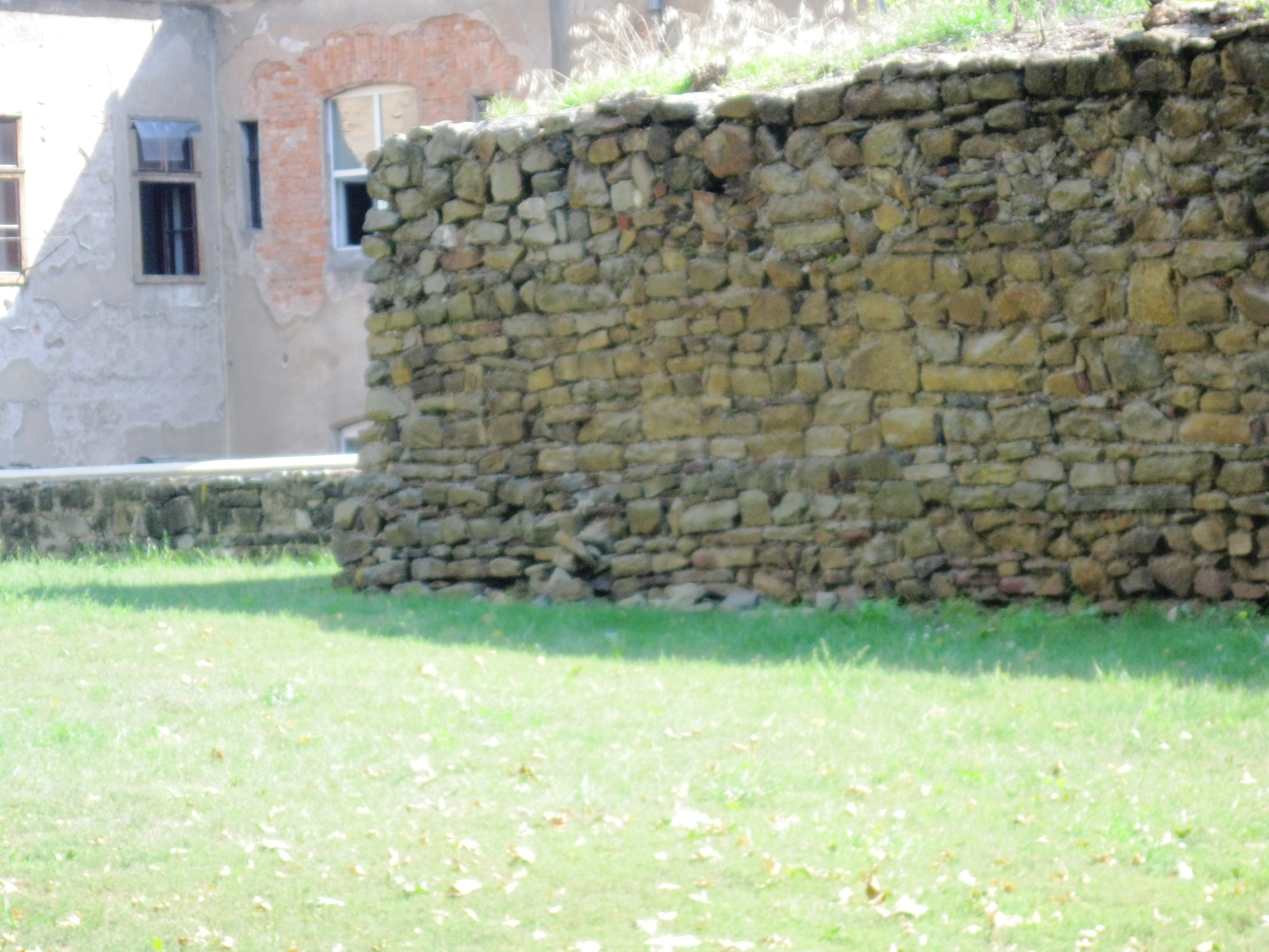 Městské opevnění - zbytky románských hradeb - Skalnatý vrch (Olomouc), na svahu SV obvodu dómského návrší, Olomouc